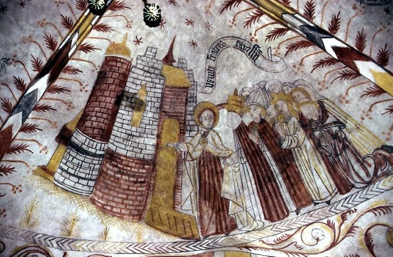 Vrå Kirke i Danmark. Korhvælv nordkappe